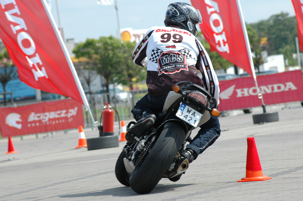 Przesuwanie środka ciężkości motocyklisty jest metodą na pogłębienie złożenia motocykla i zacieśnianie zakrętów. Na zdjęciu Wojtek "Terminator" Grodzki